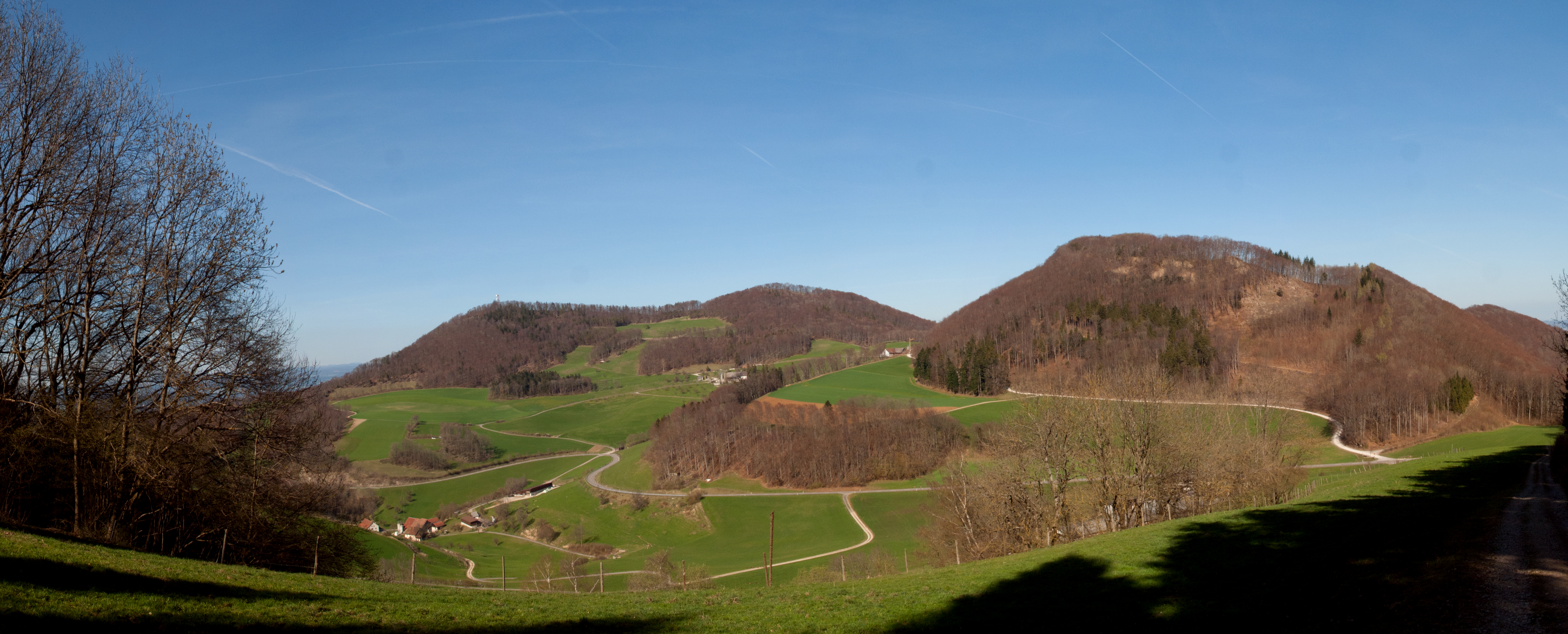 Aufnahme des Strihe und Asperstrihe (Berg rechts). Links unten die Ortschaft Benken.